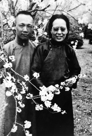 何遂夫妇